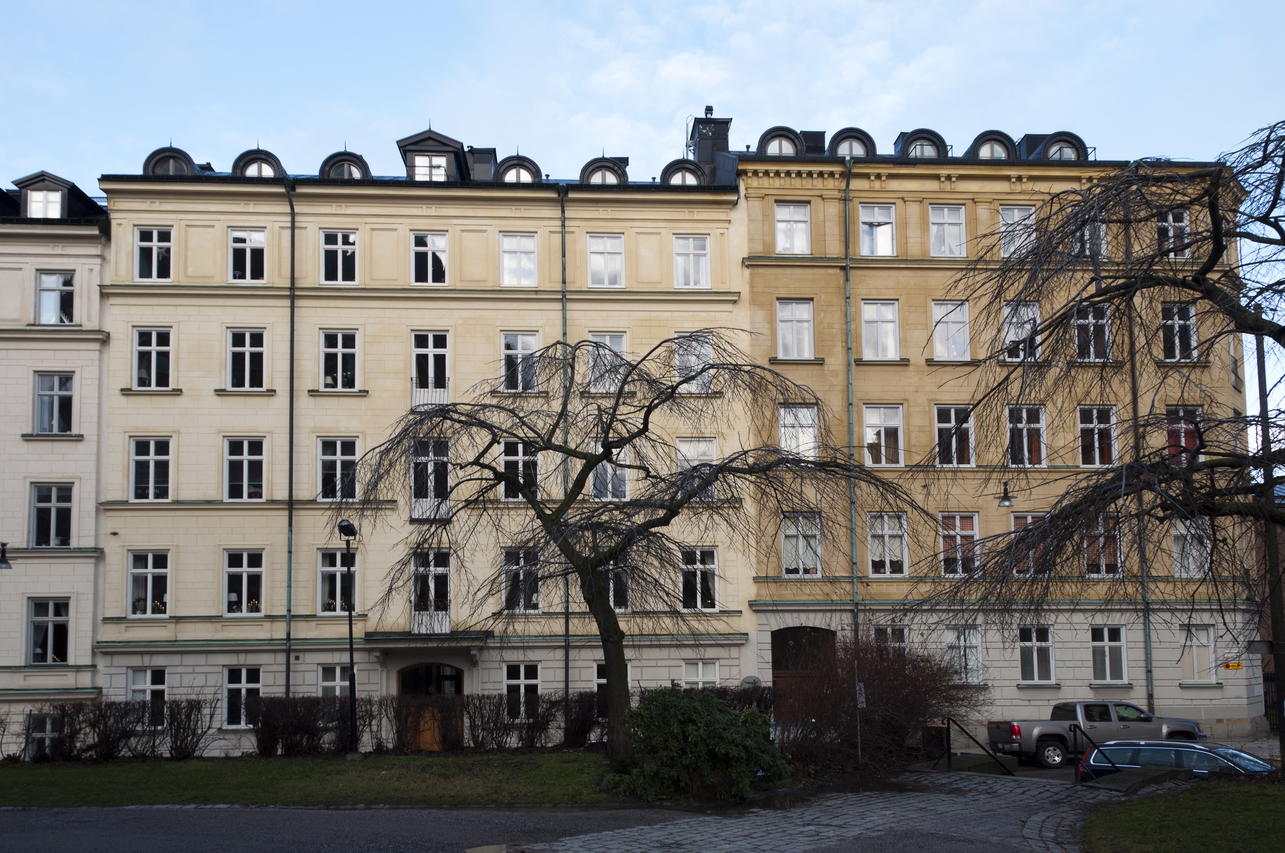 Hägerberget 41 & 42, Kammakargatan 4-6 Byggnadsår 1880-81, osignerade ritningar, byggherre C E de Champs, byggmästare J A Pettersson